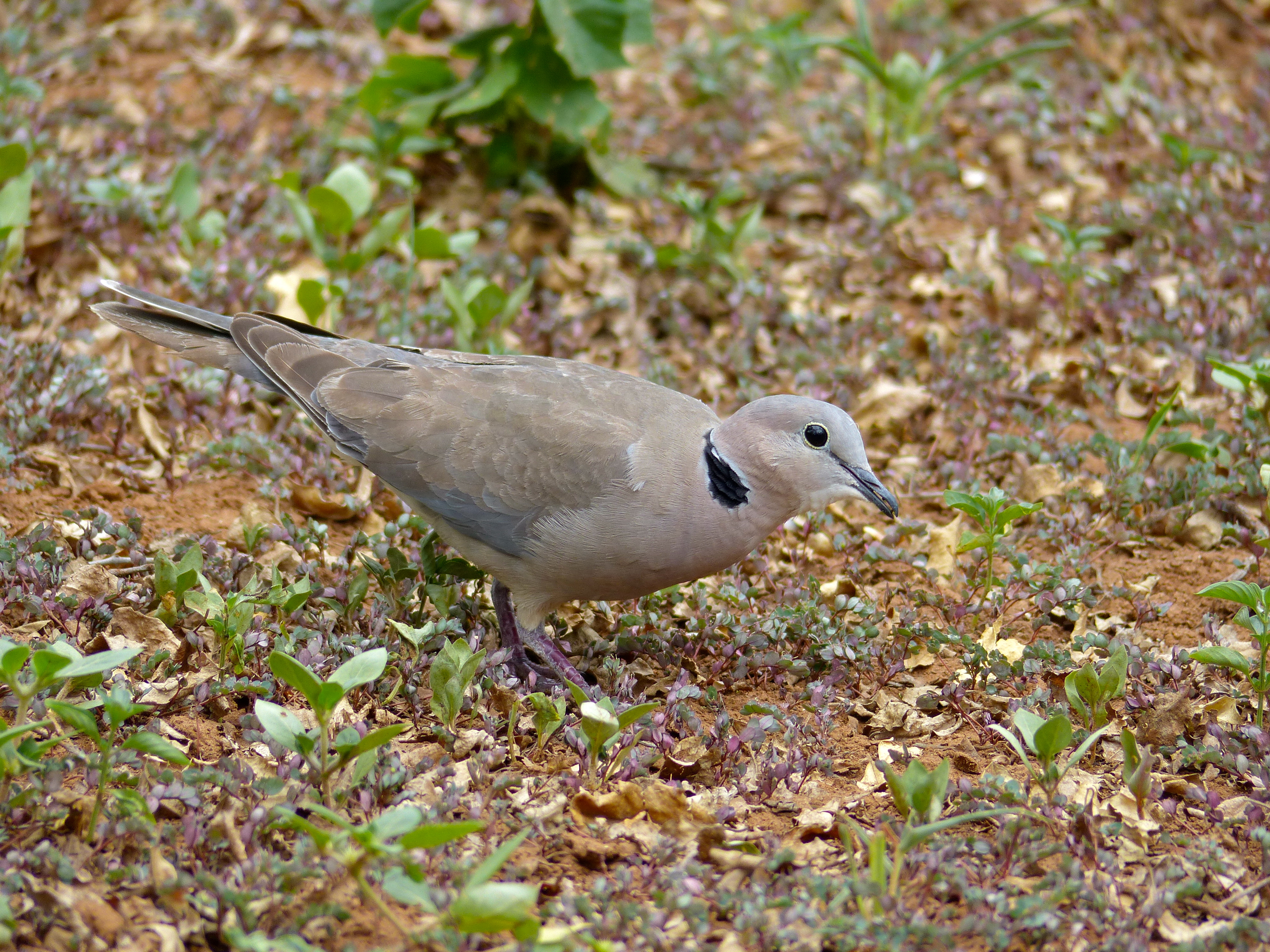 S63 Road, Pafuri area, Kruger NP, SOUTH AFRICA